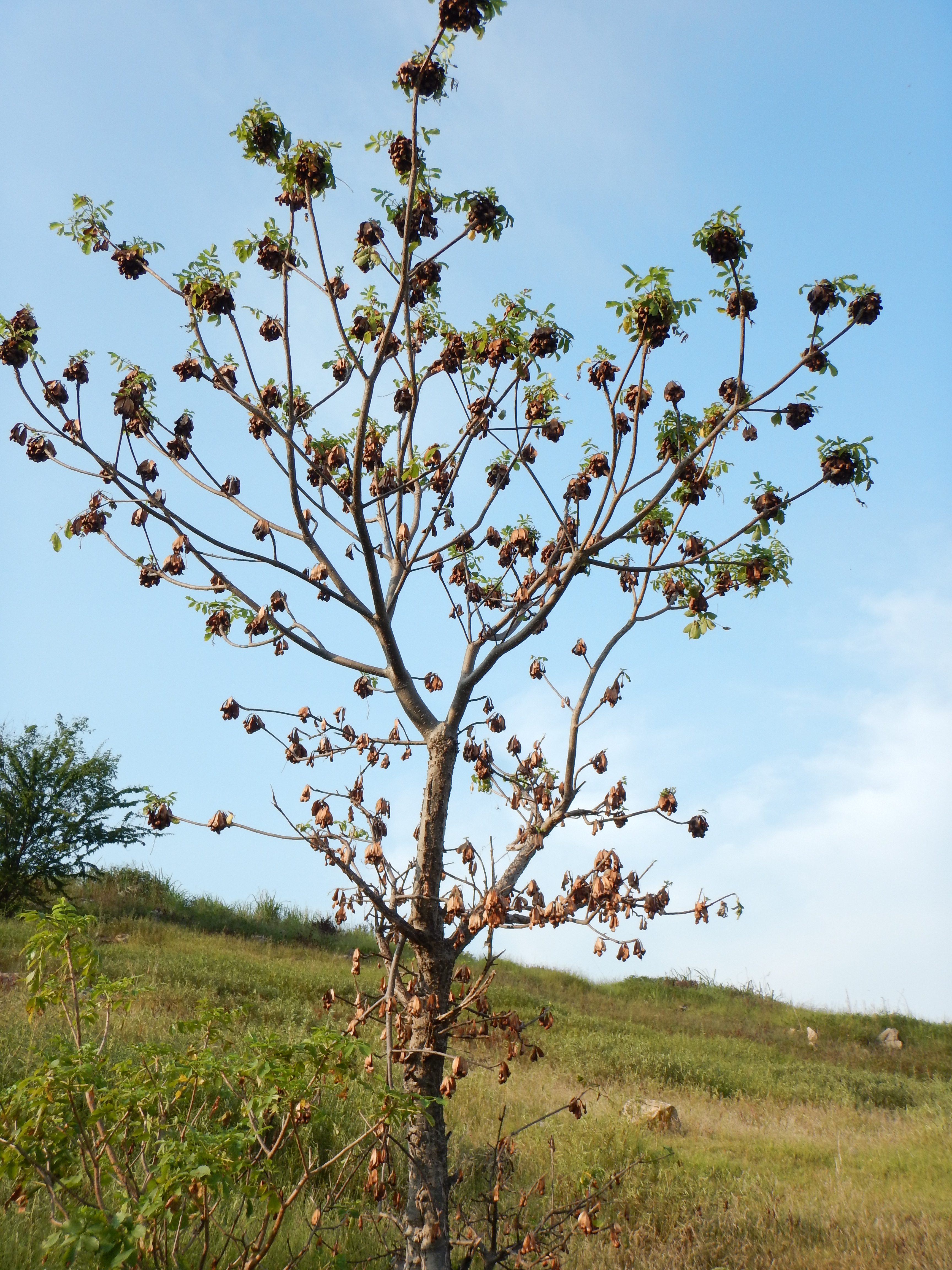 Árbol de cuachalalate con frutos.